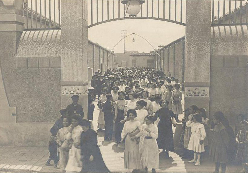 Sortida d'obreres de la fàbrica Can Casacuberta als anys 20